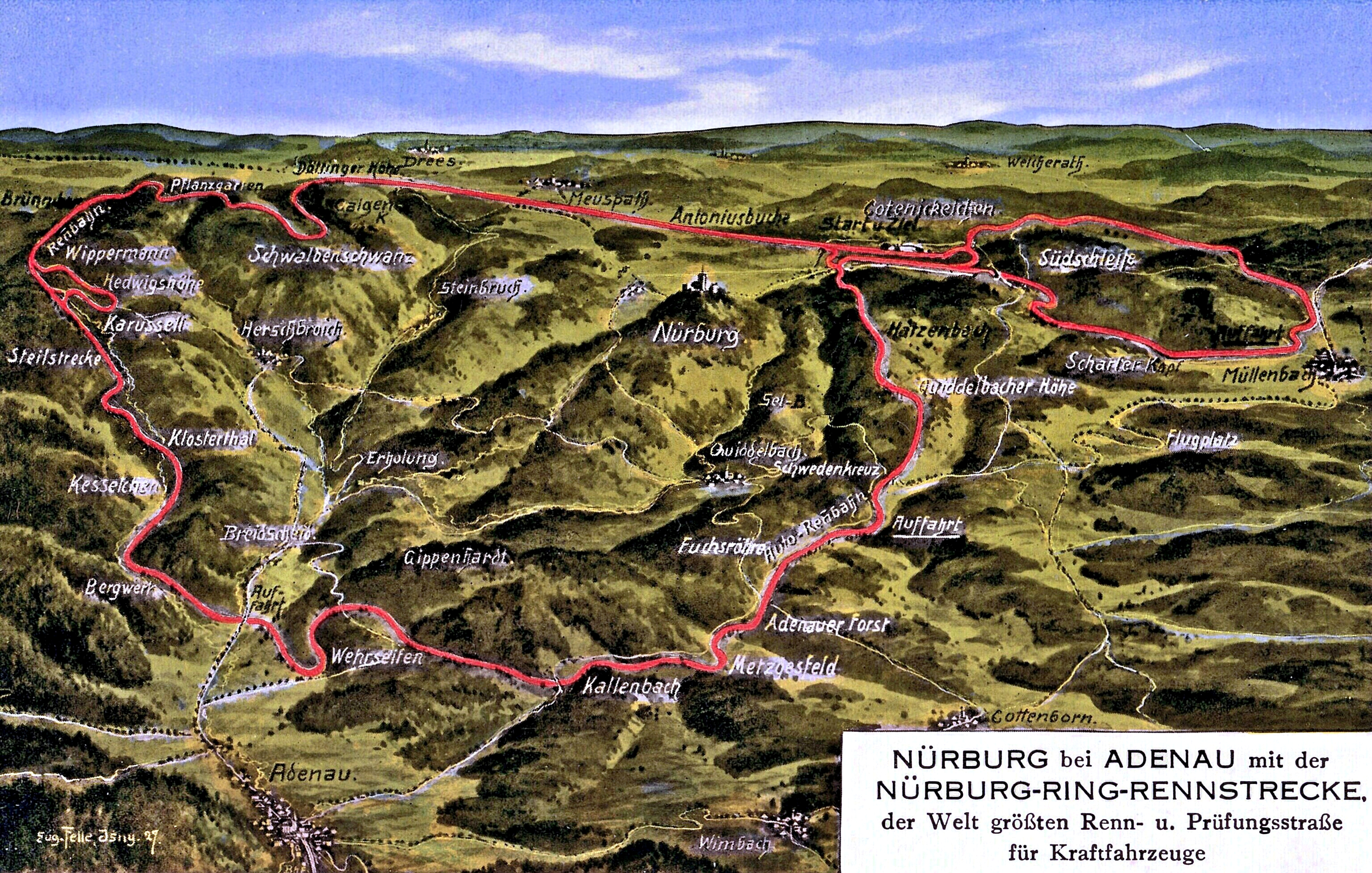 Der Nürburgring 1927, Postkarte von Eugen Felle